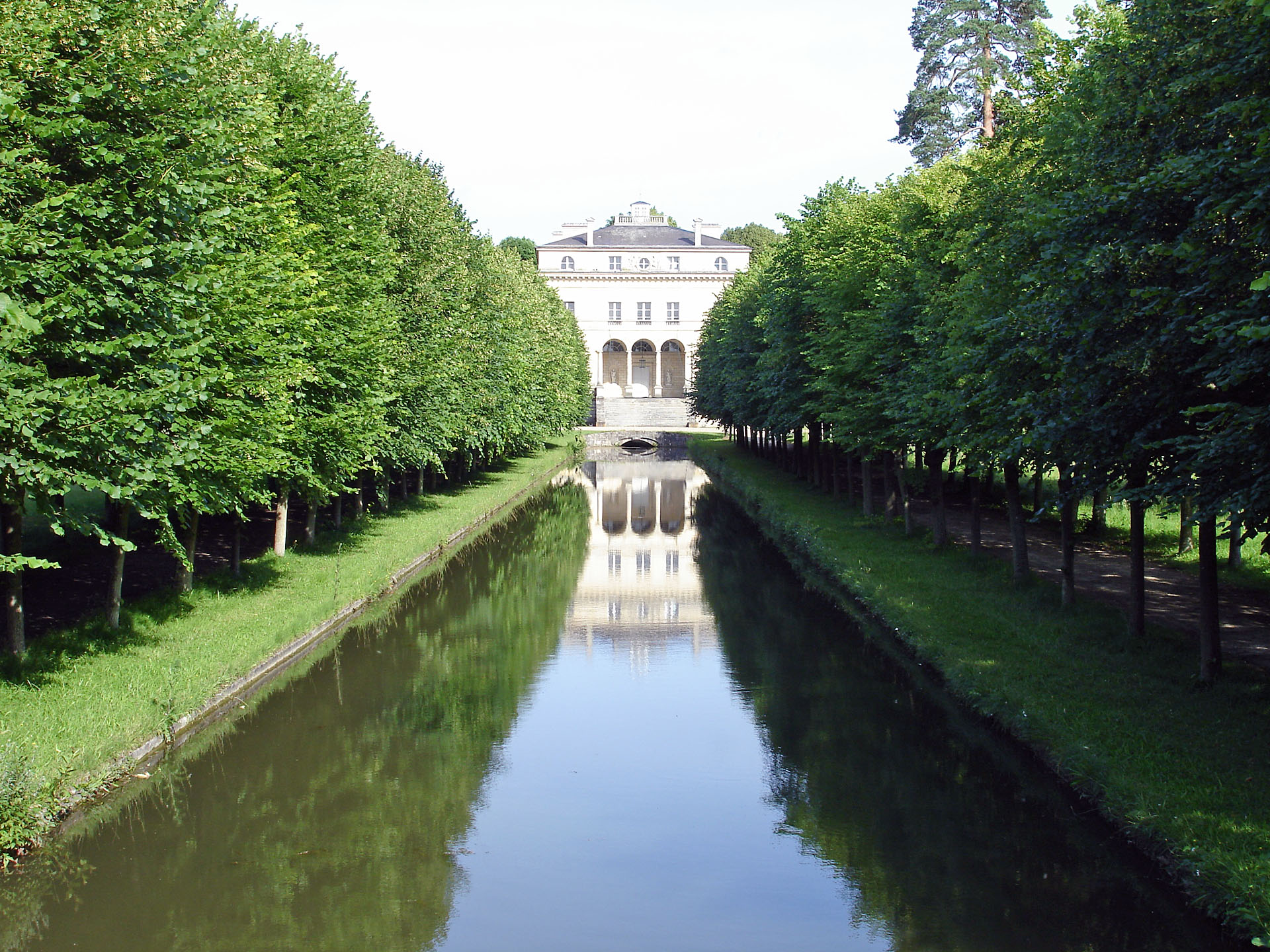 Le palais abbatial de l'abbaye de Royaumont, Val-d'Oise, France.